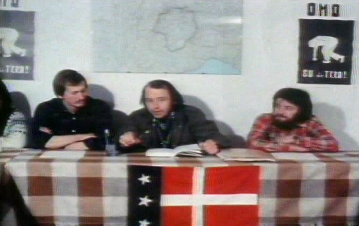 Arpetan: N'émâge d'una conference de Pierro Dôdri, en 1976 leader de lo Mouvament Harpeitanya en Vâl d'Aoûhta.